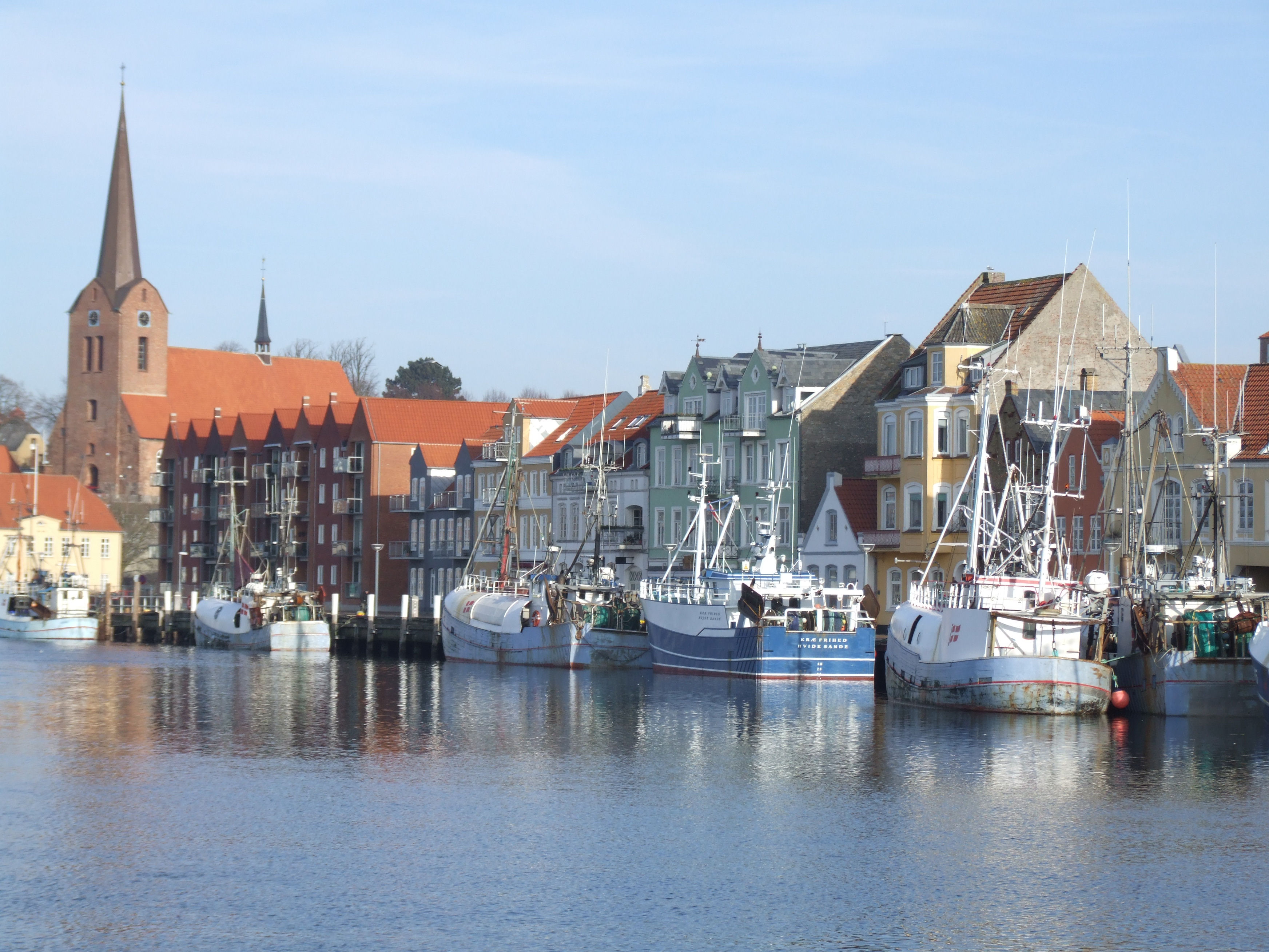 Sønderborg auf der dänischen Insel Als. Selbst fotografiert Febr. 2006. Kamera: Fuji FinePix S9500.